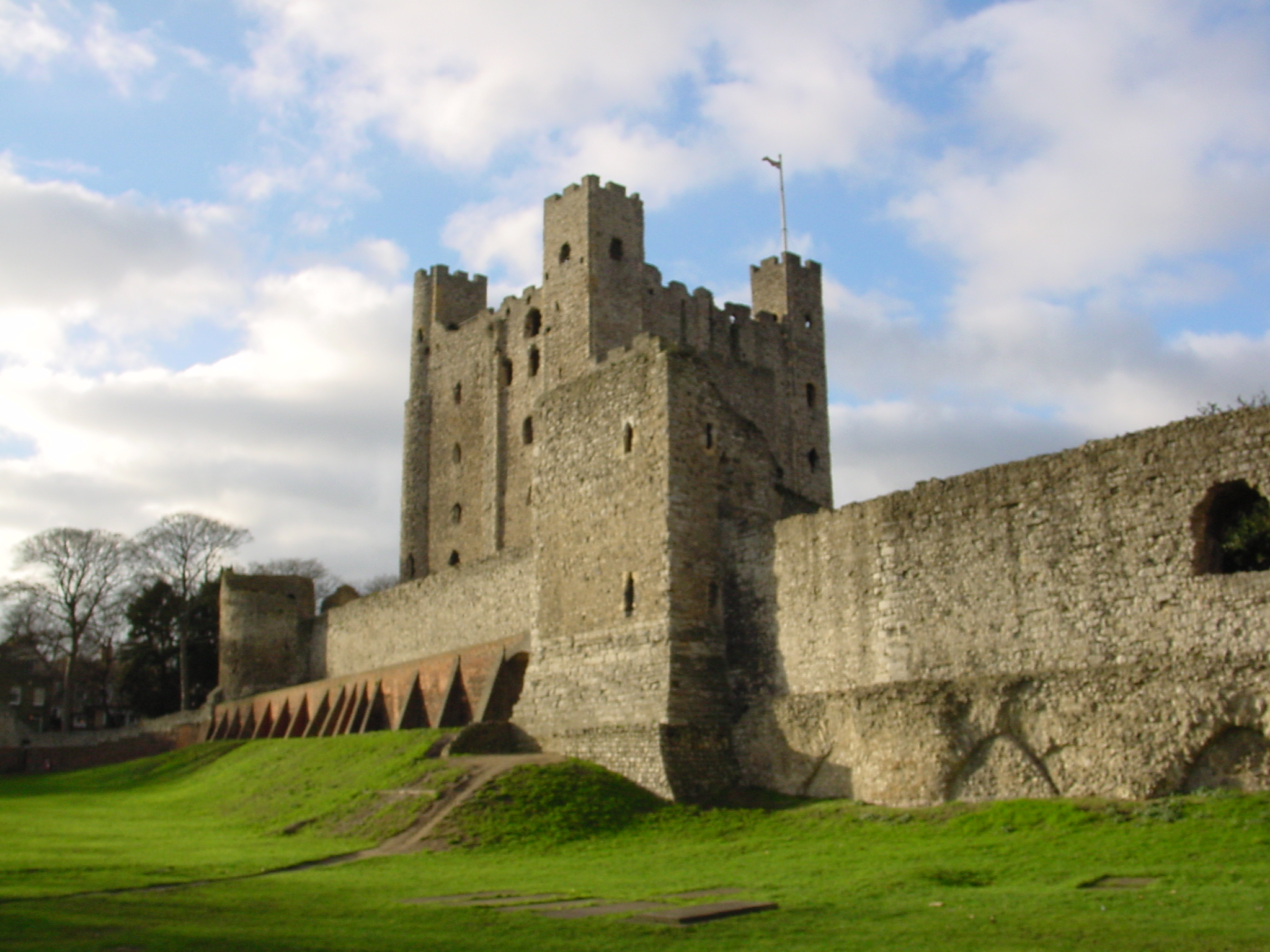 Rochester Castle